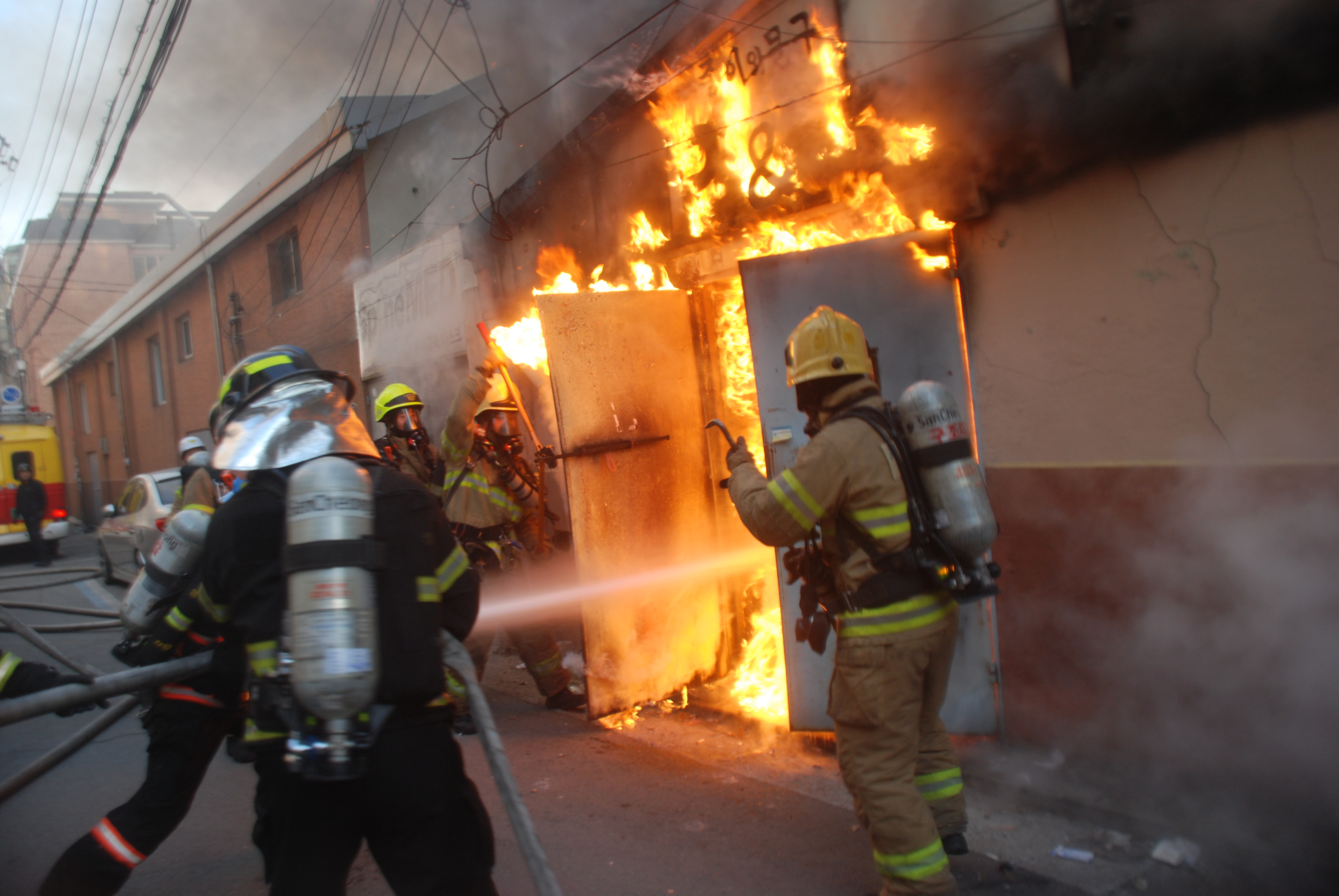 서울특별시 소방공무원 화재 진압